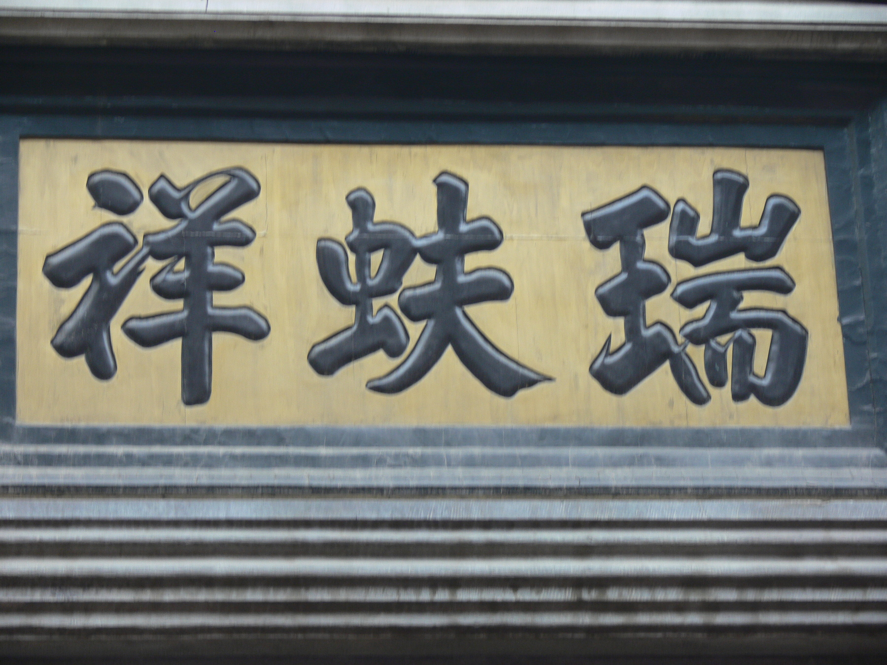 瑞蚨祥绸缎庄